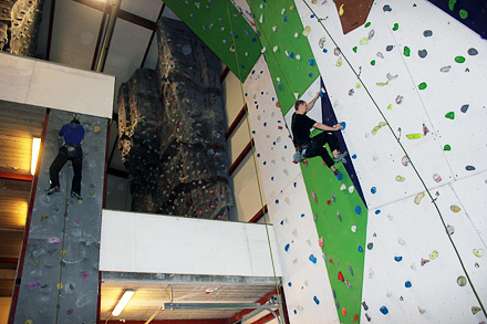 Ute-hallen i Trondheim